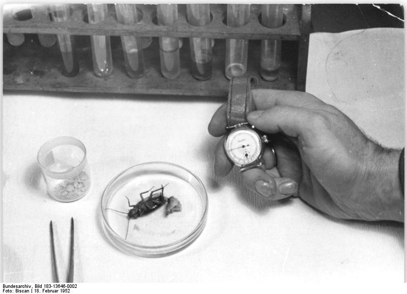 Magdeburg, Test eines Insektenbekämpfungsmittels Zentralbild Biscan 18.2.1952 Der Verdiente Erfinder Dr. Elmar Profft Leiter der Forschungslaboratorien der volkseigenen Aleid-Werke Fahlberg-List in Magdeburg besitzt über 60 verschiedene Patente. Er hat nicht nur wertvole Medikamente entwickelt, sondern auch für unsere Bekleidungs- und Lebensmittelindustrie bedeutende Erfindungen gemacht. UBz: Dr. Profft hat u.a. Schädlingsbekämpfungsmittel geschaffen. Die Wirkung des Giftes wird an einer Schabe mit der Stoppuhr überwacht.